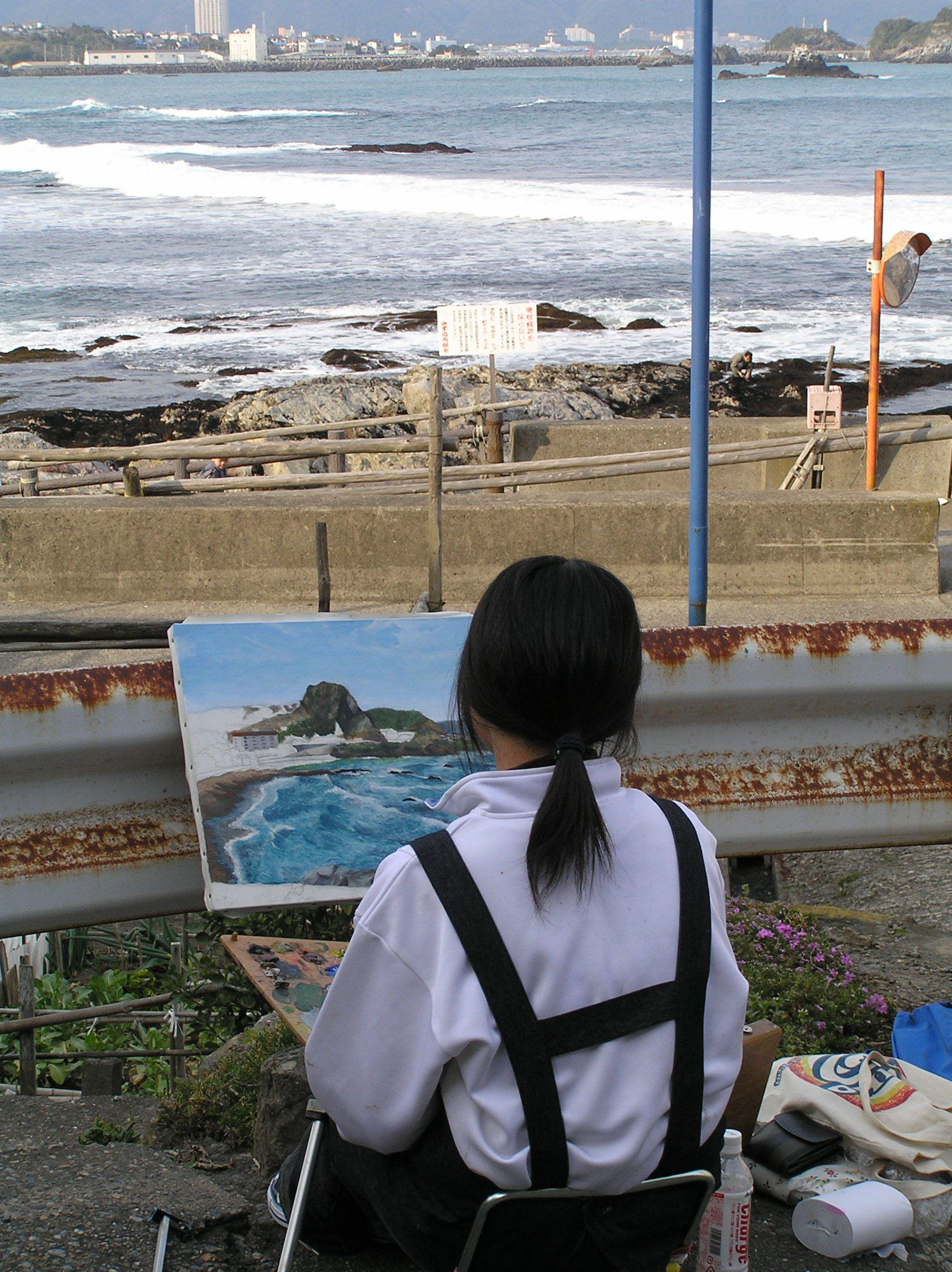 ねじ式の舞台太海海岸にて。～photo by Autumn Snake 【おぉたむ すねィく探検隊】写真部門 担当 大原佳苗